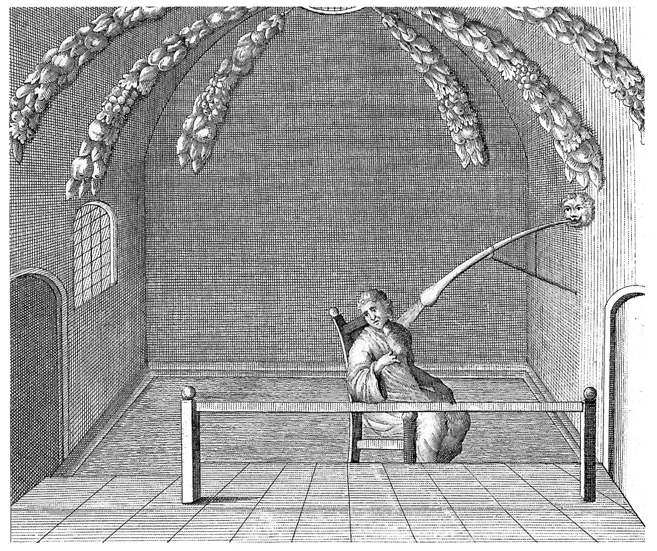 " Die Art, wie man das warme Wasser auf die schwachen Glieder fließen lässet"; Thermalwasserdusche Anfang des 18. Jahrhunderts im Rosenbad, entwickelt durch Franciscus Blondel